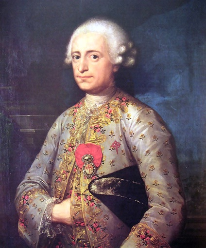 Retrato de José Joaquin Silva Sarmiento VI Marqués de Arcicóllar